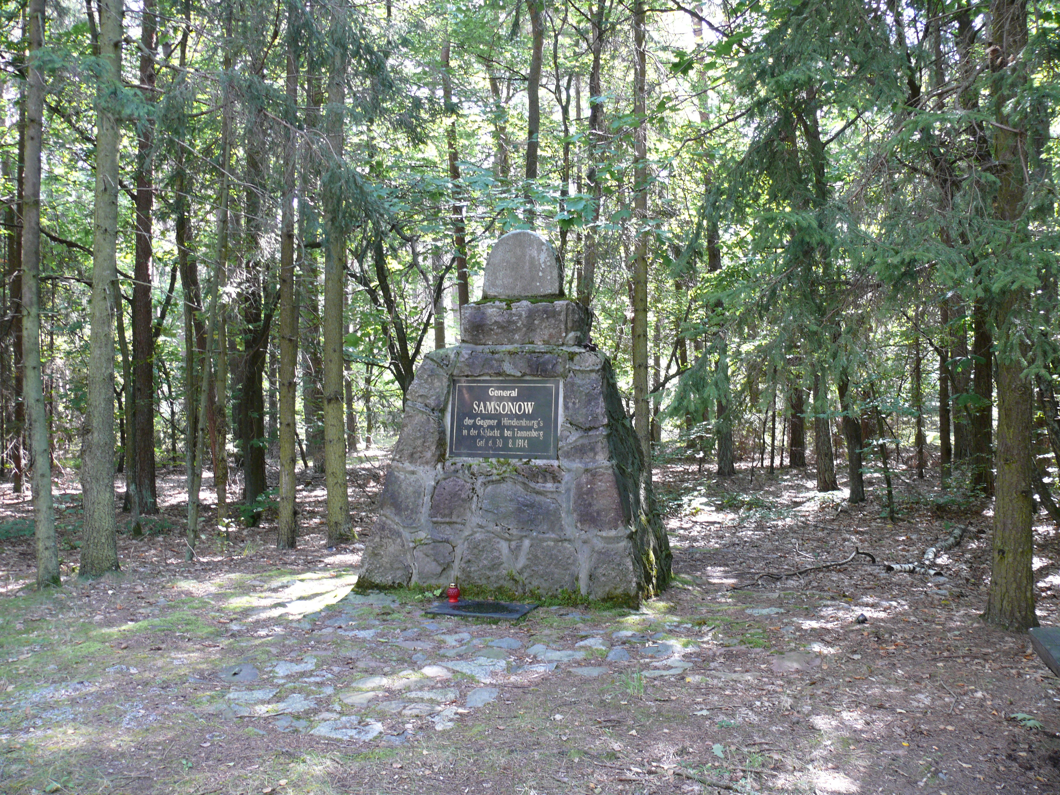 Gedenkstein für den russischen General Samsonow, der aufgrund der verlorenen Schlacht sich hier erschoss.